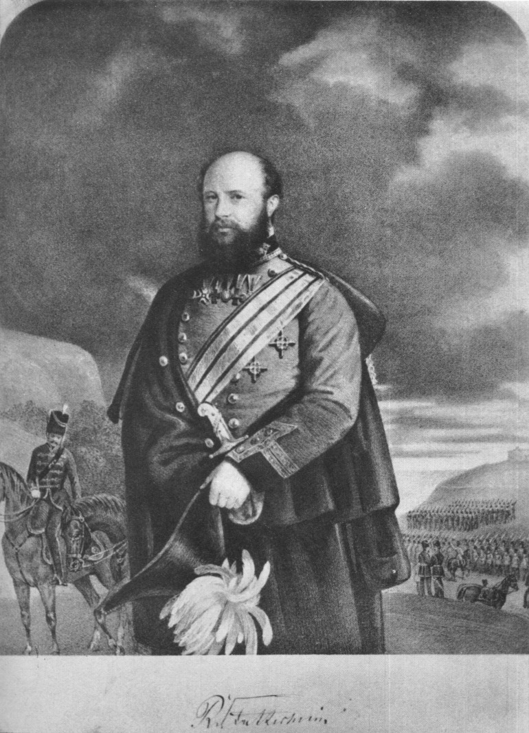 Richard [Carl Gustav Ludwig Wilhelm Julius] von Stutterheim (10.08.1815-05.11.1871) britischer Generalmajor